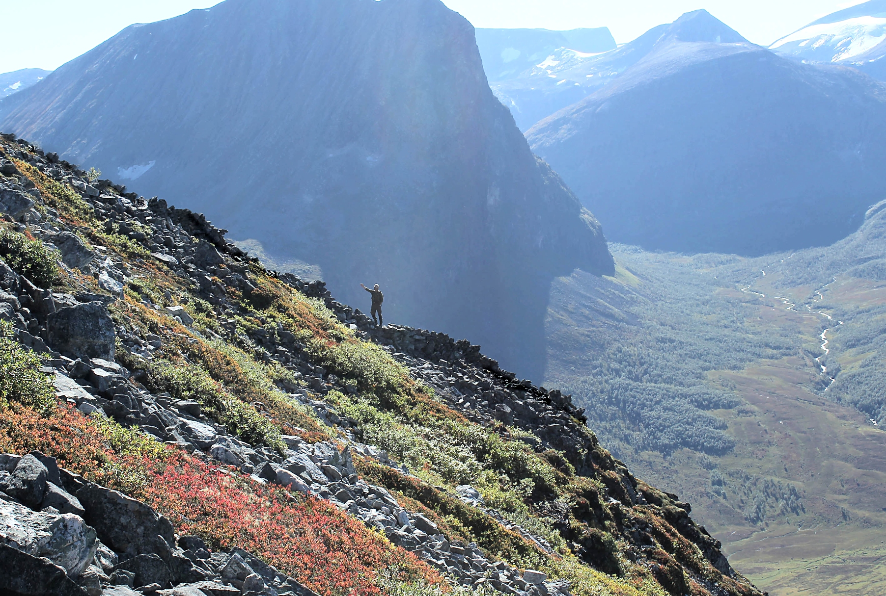 Steingard på Veslejordshornet i Norddal kommune.